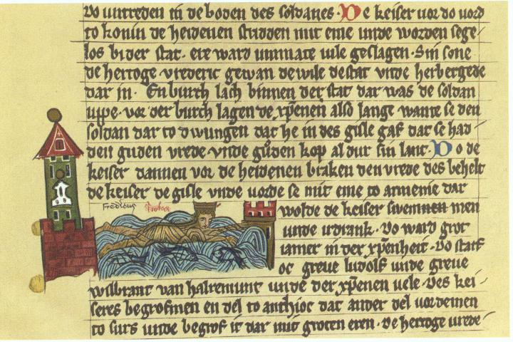 Barbarossa ertrinkt im Saleph; Faksimile nach einer Miniatur aus der Gothaer Handschrift der sächsischen Weltchronik um 1280 (Forschungs- und Landesbibliotkek Gotha)